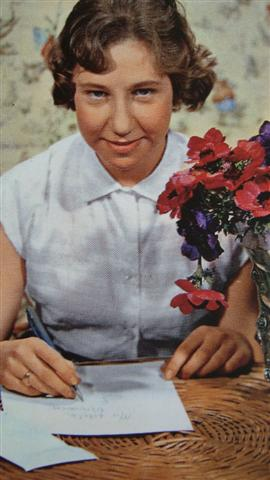 Dagboek en rituelen